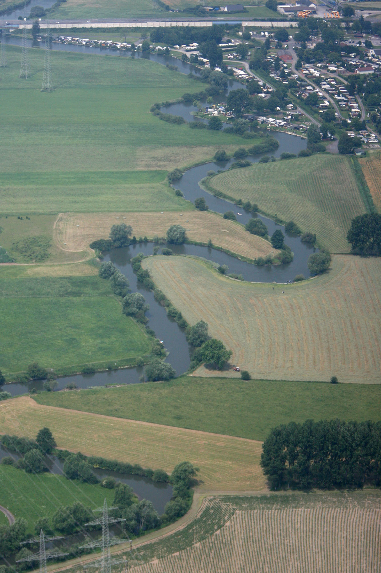 Luftbildaufnahme: Die Lippe bei Hamm und Lippetal in Nordrhein-Westfalen; Blick entlang des Flusses in Richtung Nordwesten. – Oben im Bild die Brücke der Bundesautobahn 2 und der Campingplatz „Uentrop/Helbach“ in Lippetal. Die Lippe (Flussmitte) bildet hier die Grenze zwischen der Gemeinde Lippetal im Kreis Soest (nördlich bzw. rechts im Bild) und der kreisfreien Stadt Hamm (südlich bzw. links im Bild). Die Flächen links gehören zum Naturschutzgebiet „Schmehauser Mersch“ (NSG HAM-007), die Flächen rechts (ohne den Campingplatz) gehören zum Naturschutzgebiet „Lippeaue“ (NSG SO-007).